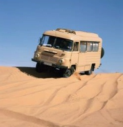 Robur Allrad Mehrzweckbus, (vermutlich ein LD 2202-AFr-6/MZ17) auf einer Sanddüne